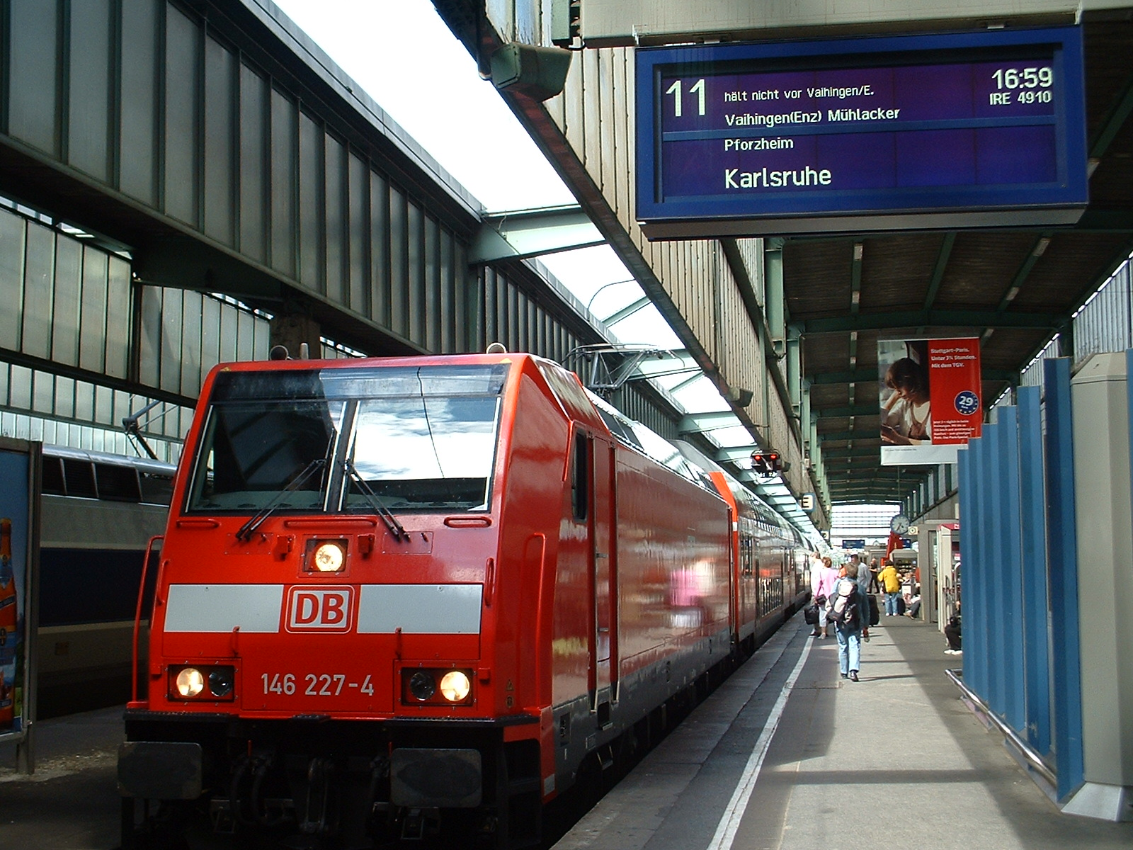 Interregio-Express nach Karlsruhe im Stuttgarter Hauptbahnhof